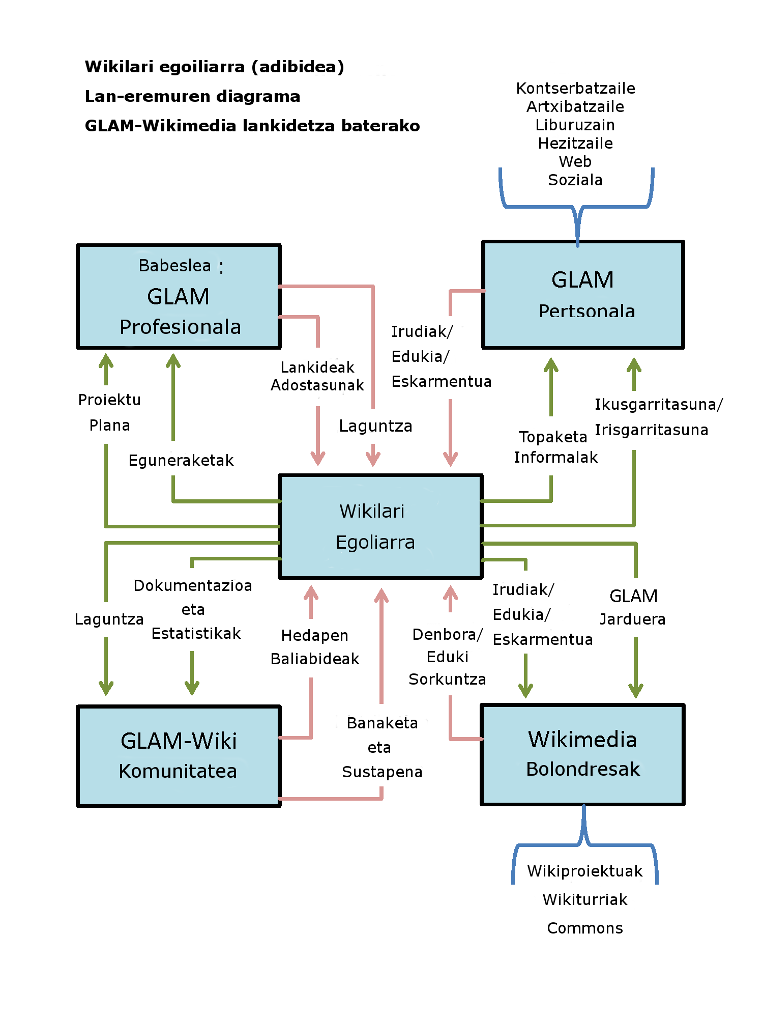 Wikilari egoiliar diagrama